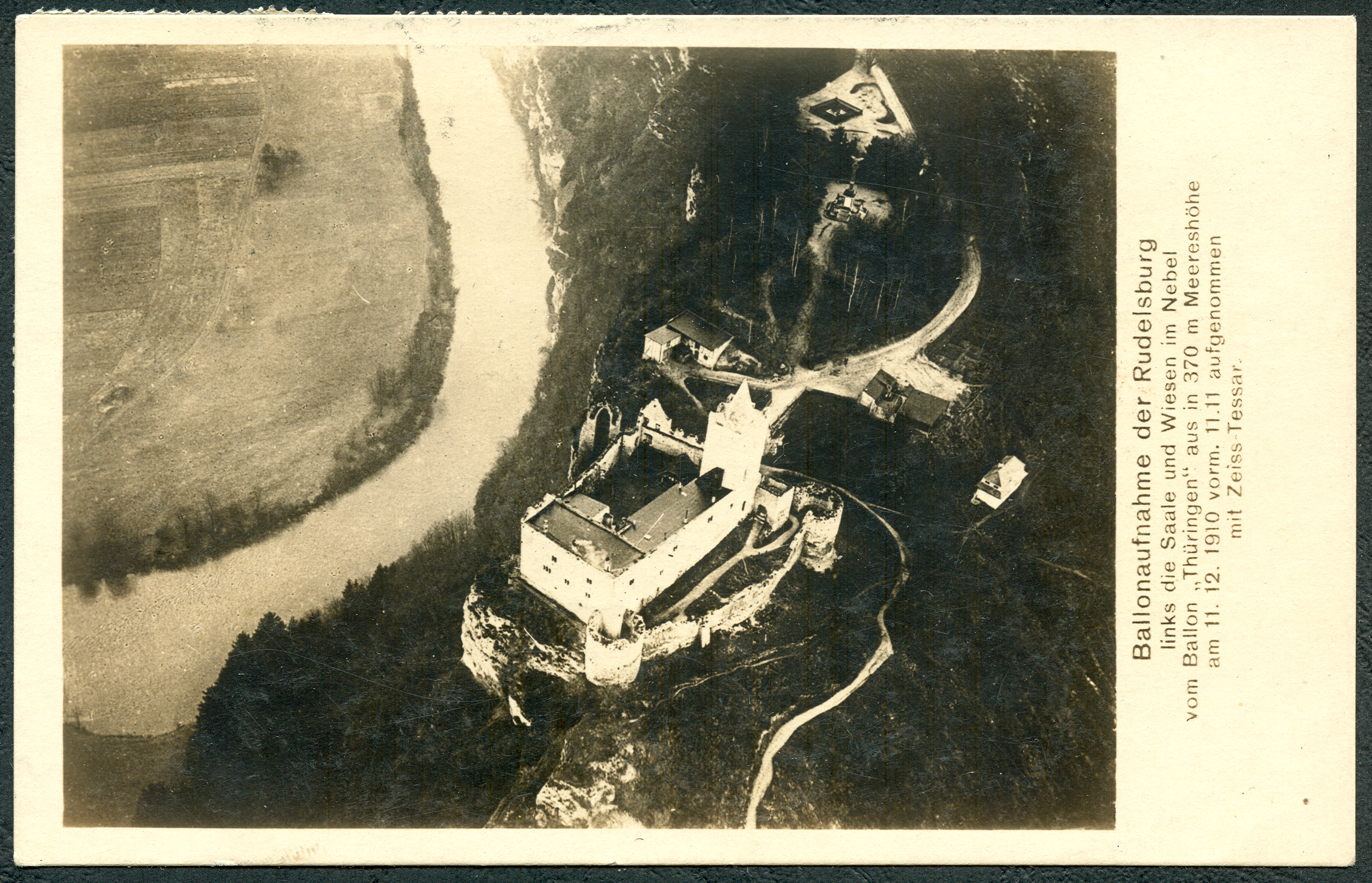 Luftbildkarte Nr. 11 aus dem Pallas-Verlag in Jena, betitelt „Ballonaufnahme der Rudelsburg, links die Saale und Wiesen im Nebel, vom Ballon "Thüringen" aus in 370 m Meereshöhe am 11. 12. 1910 vorm. 11. 11. aufgenommen mit Zeiss Tessar.“ ...